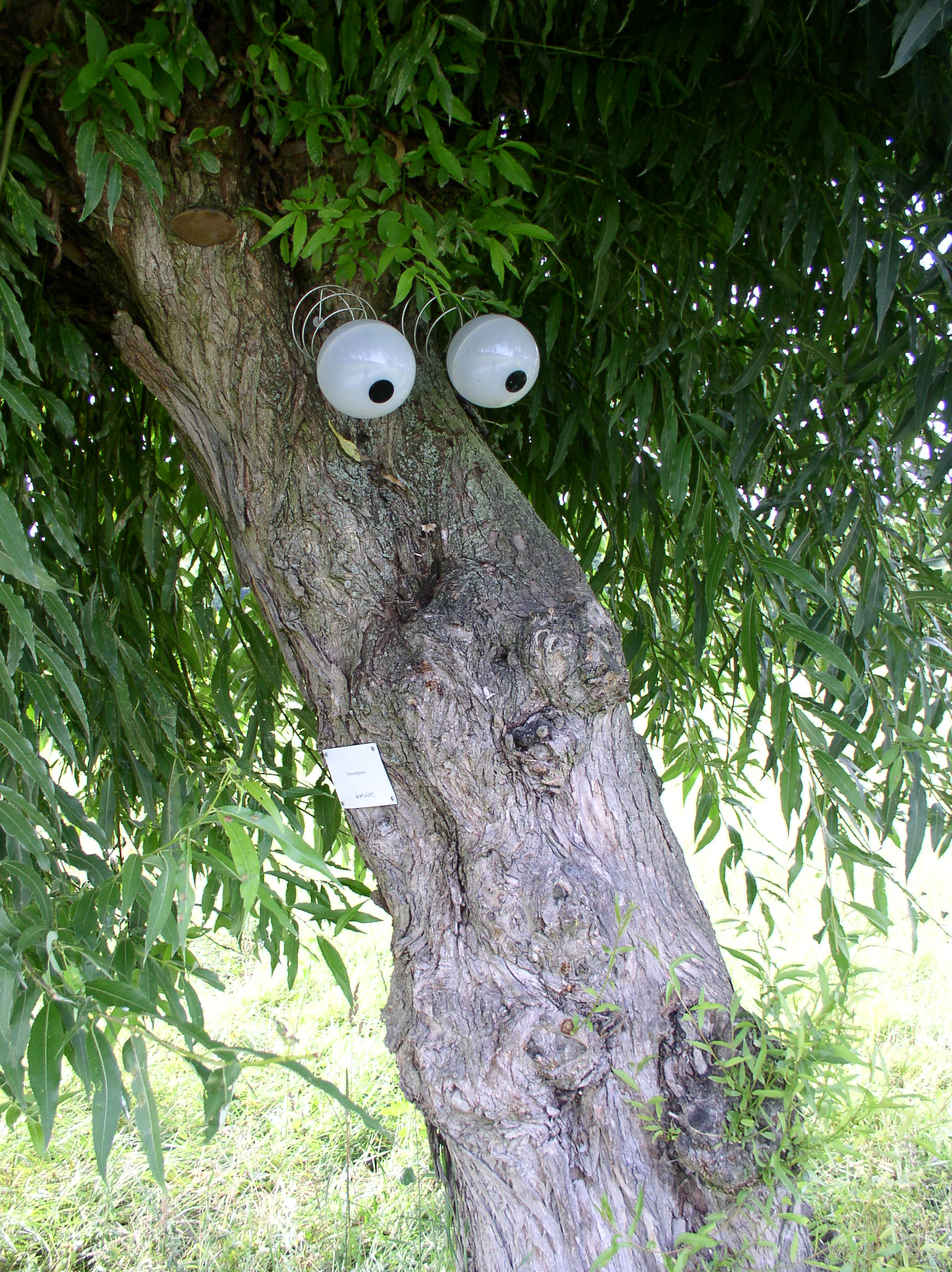 Der Struwwelpeter-Baum ist eine Skulptur, die dauerhaft in den Schwanheimer Wiesen im Frankfurter Stadtteil Schwanheim ausgestellt ist. Er ist ein Kunstwerk der Reihe Komische Kunst im GrünGürtel und wurde entworfen vom Frankfurter Zeichner und Autor F. K. Waechter